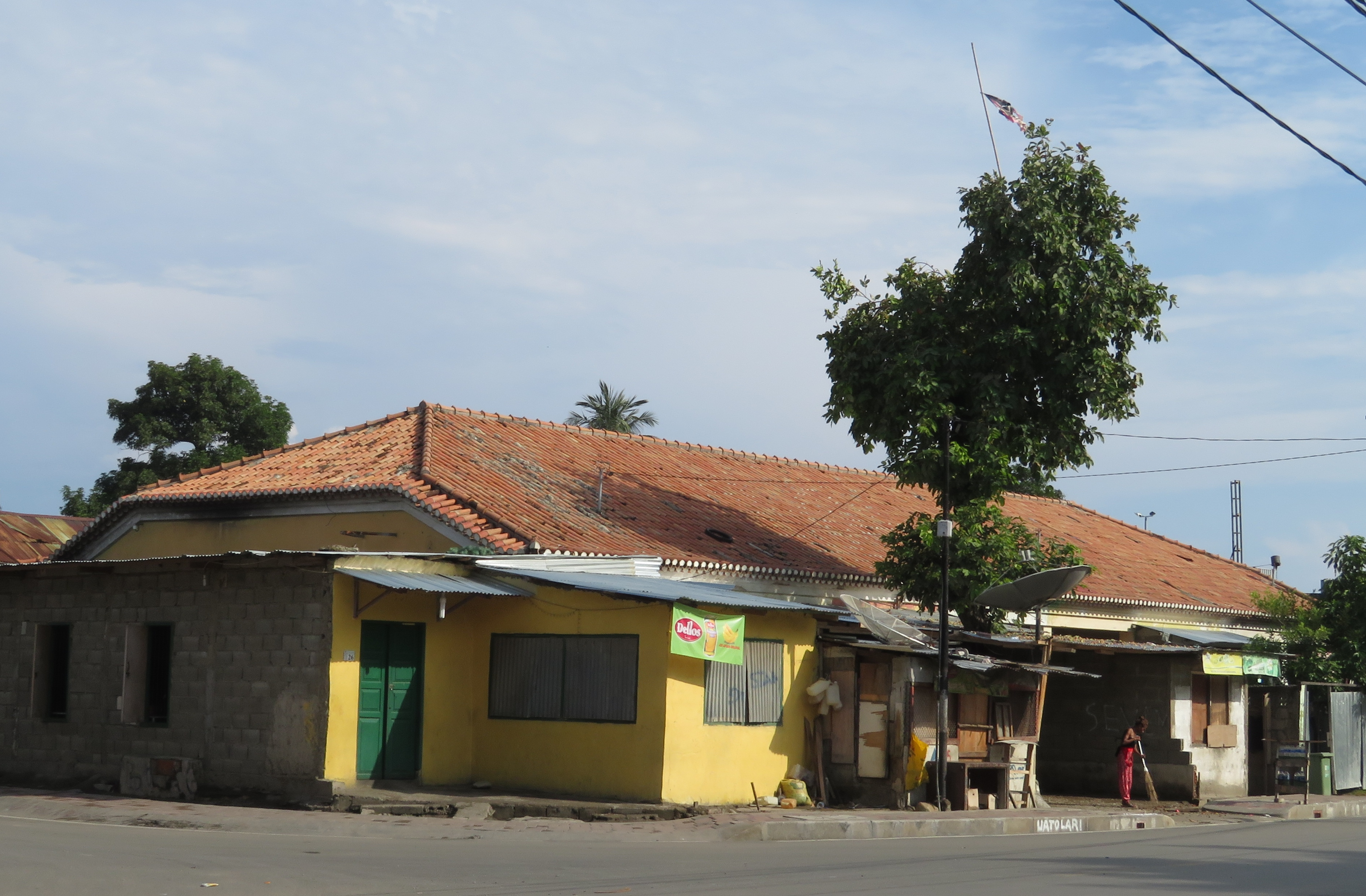 Ehem. Wohnheim für ledige Kolonialbeamte ("Messe Para Funcionários Solteiros"), erb. 1953, Dili, Osttimor